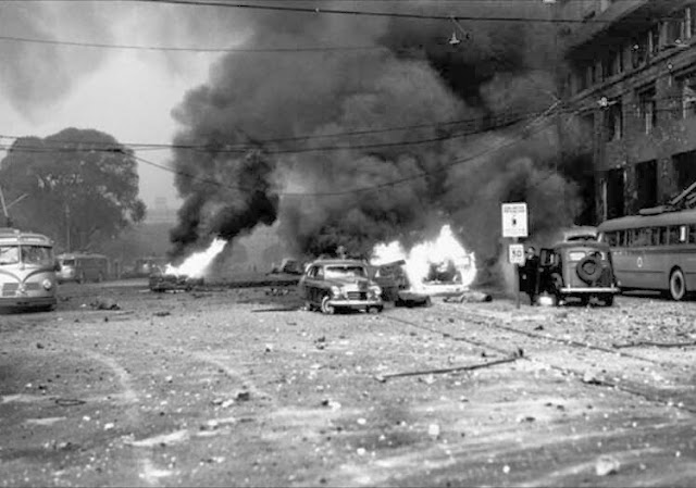 Escenas dantescas en inmediaciones de la Casa de Gobierno